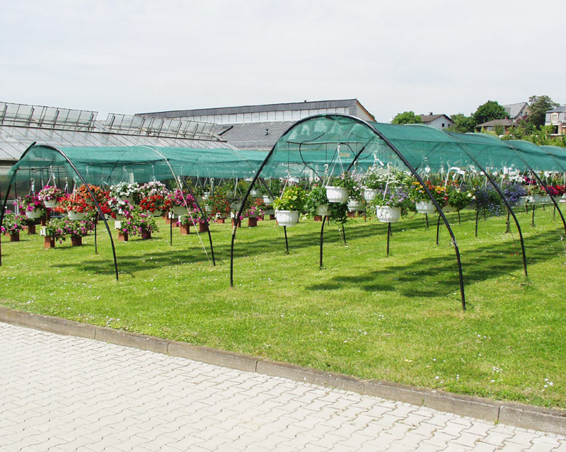 Test von Beet- und Balkonpflanzen im Fachgebiet Zierpflanzenbau, fotografiert 2002